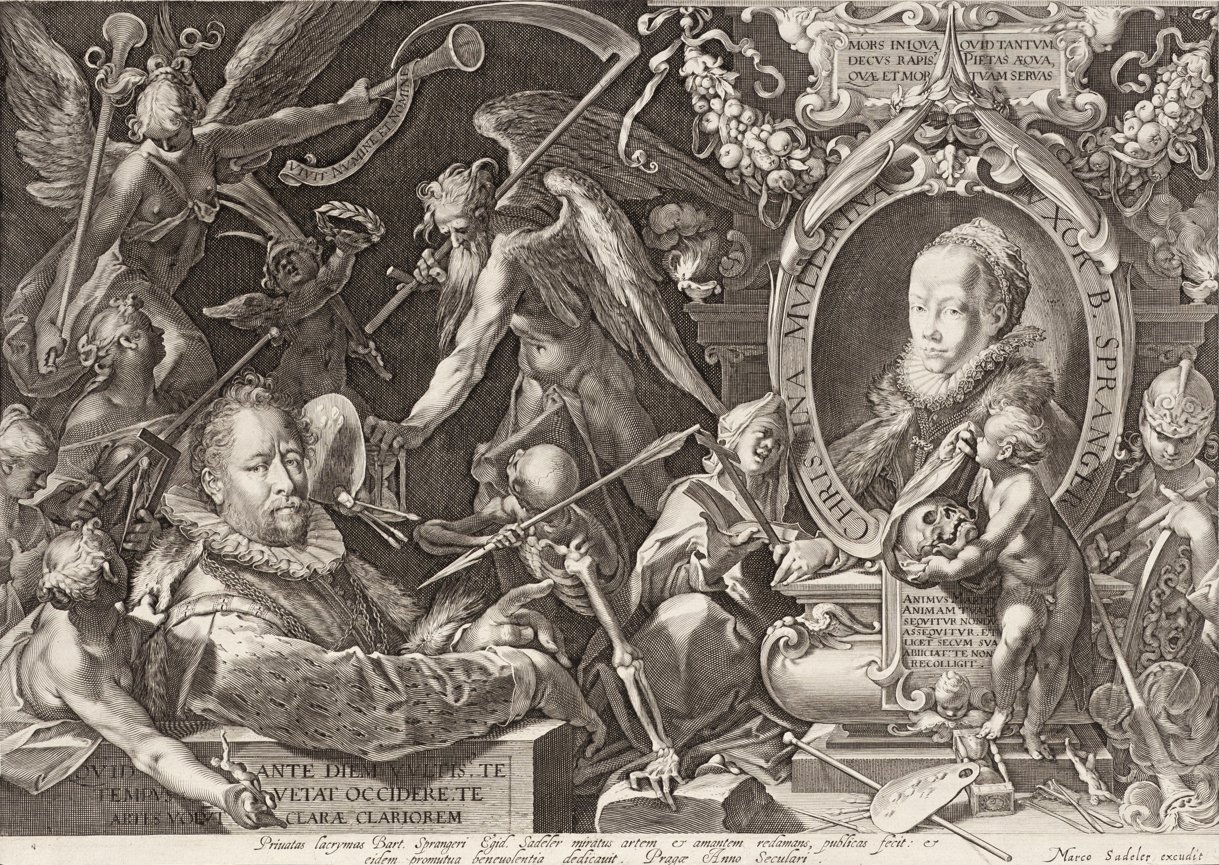 Egidius Sadeler:Alegorický dvojportrét Bartholomea Sprangera a jeho zesnulé choti Christiny (1600), mědiryt, II. stav, 290x411 mm, Národní galerie v Praze